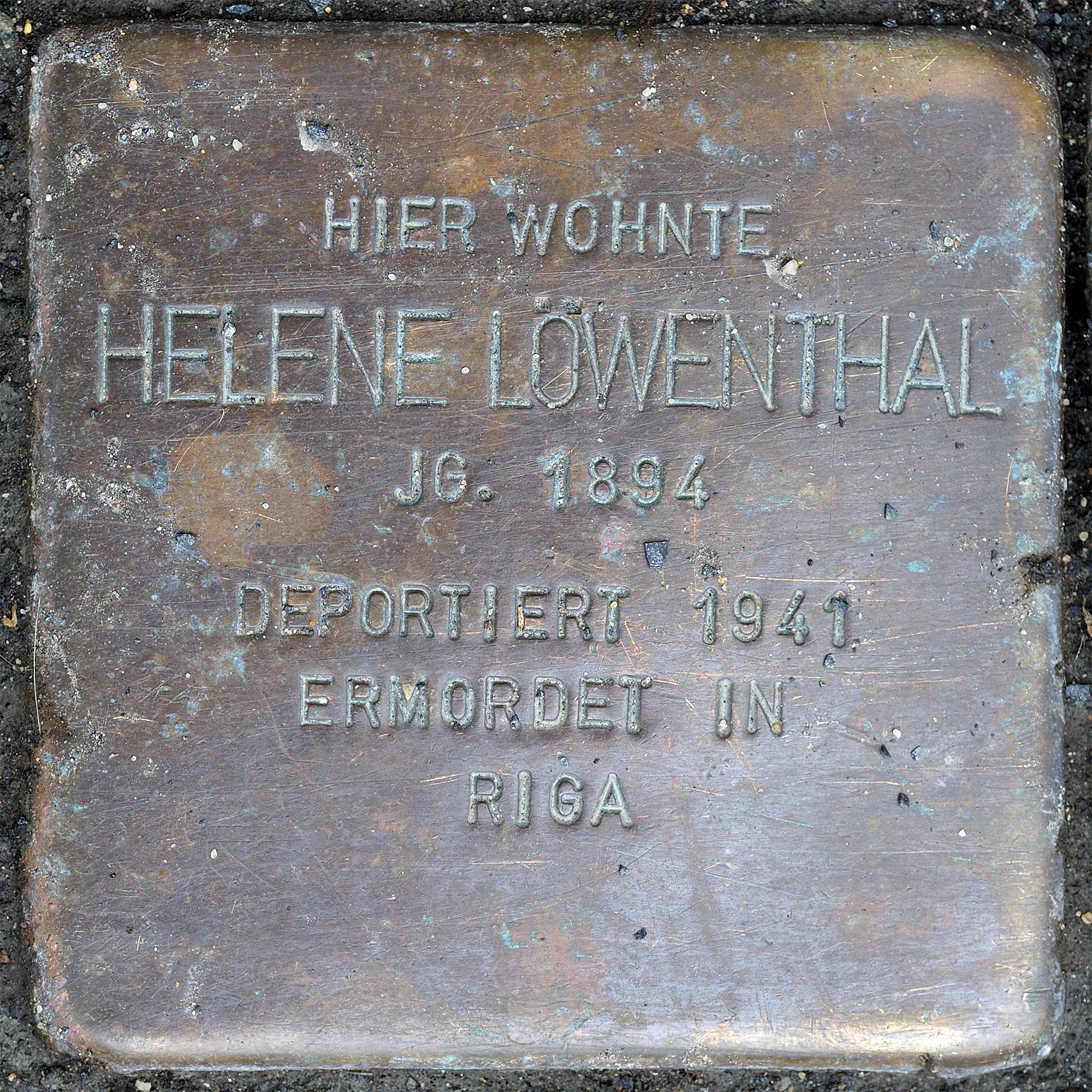 Stolpersteine GV: Löwenthal Helene